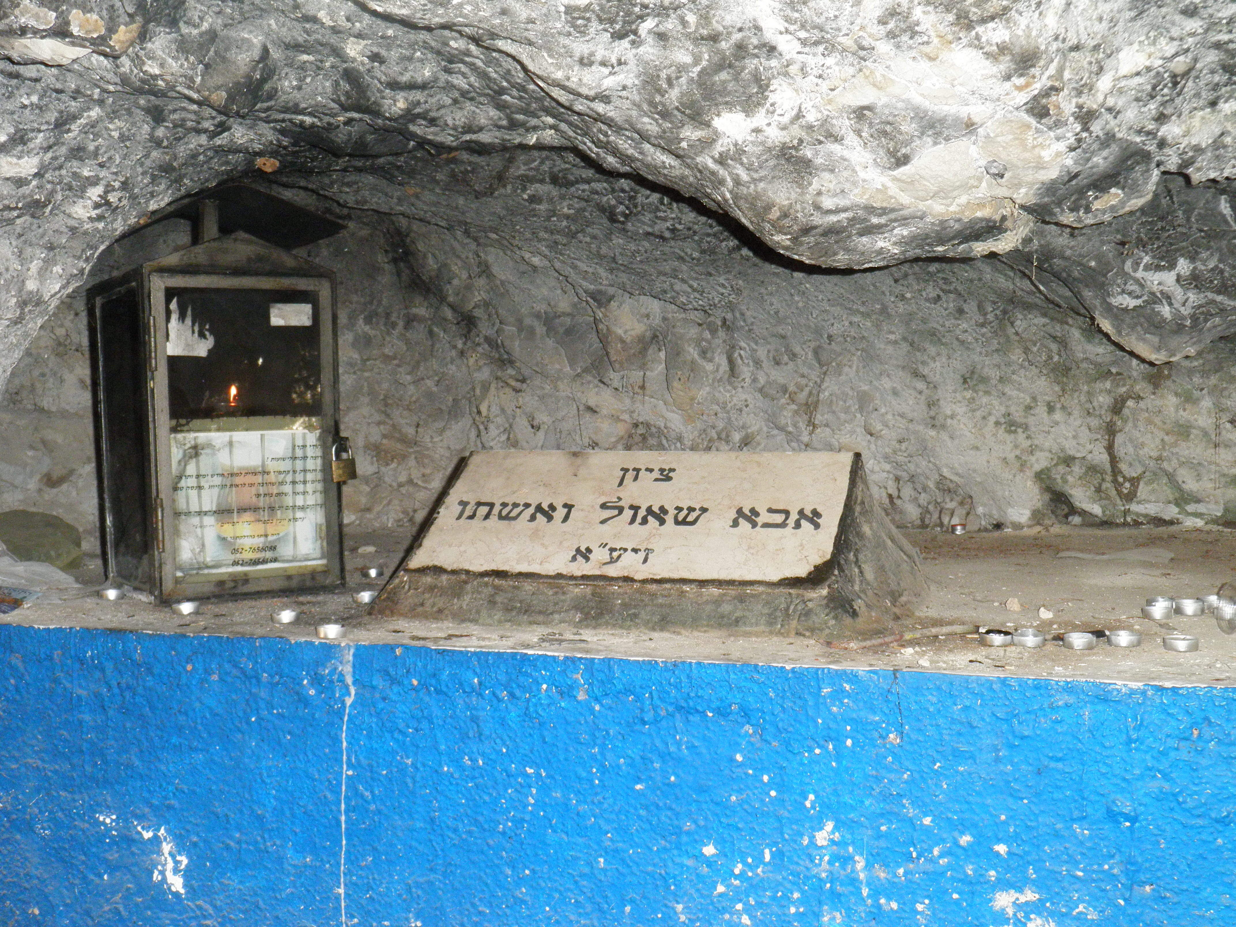 קברם של התנא אבא שאול ואשתו